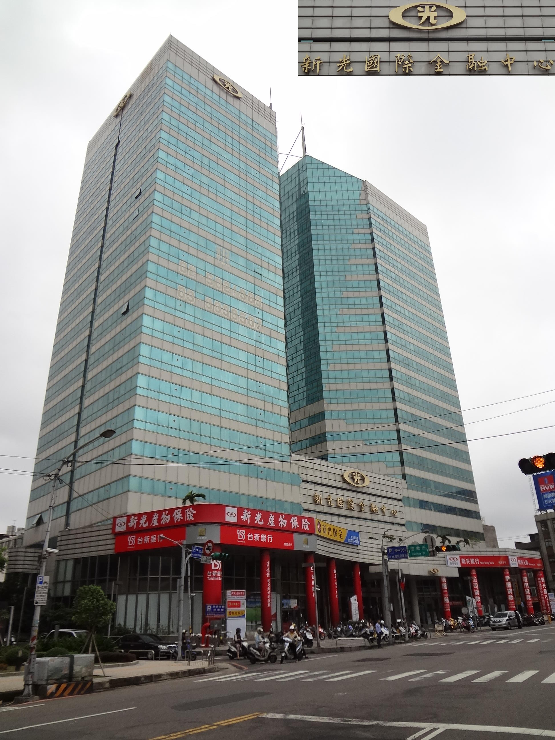 新光國際金融中心，地址：桃園縣桃園市復興路205、207號。